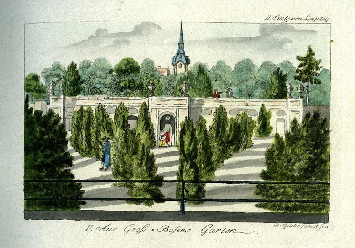 Im Großbosischen Garten mit dem Turm der Johanniskirche im Hintergrund